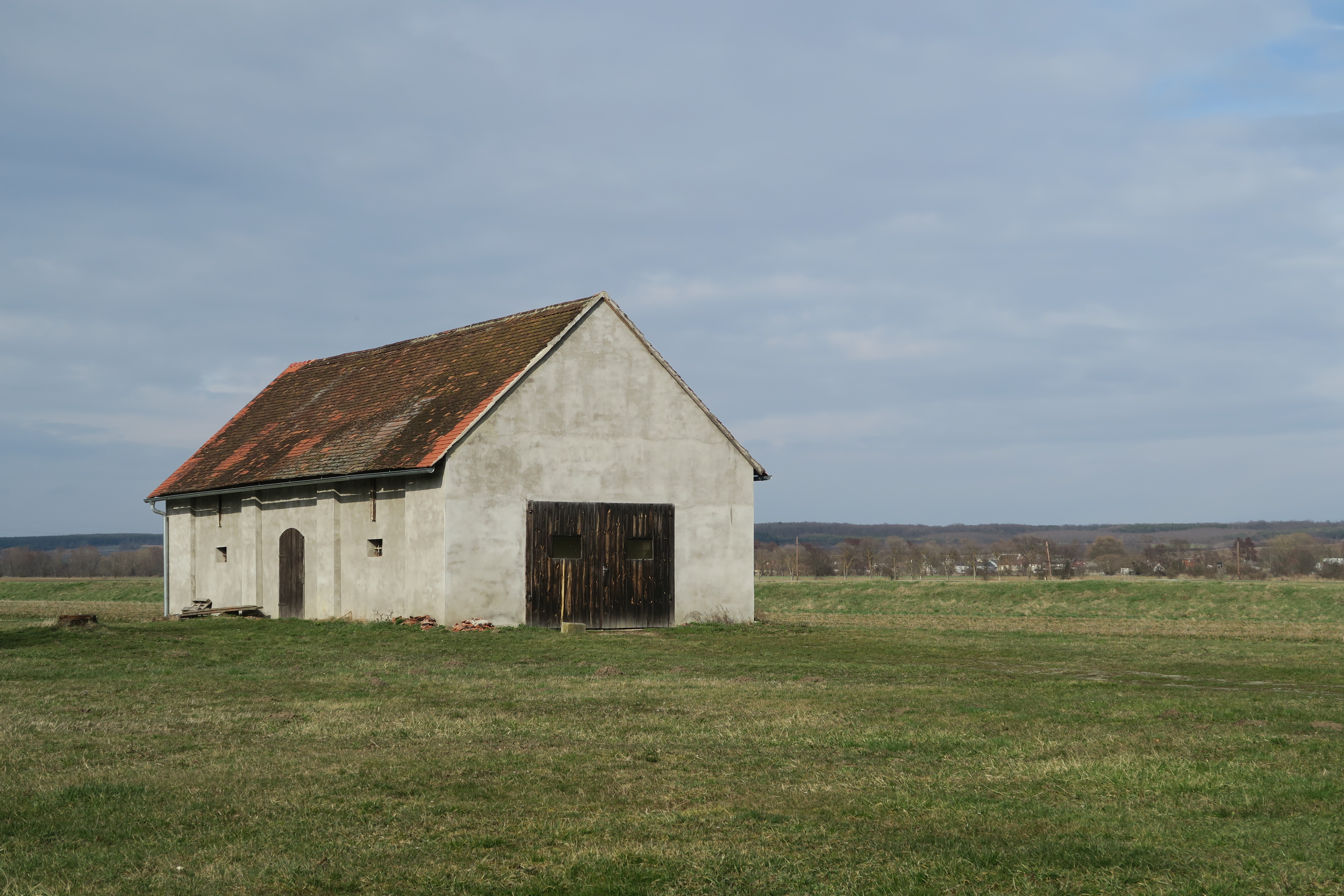 In diesem Stadl waren die jüdischen Zwangsarbeiter vor der Hinrichtung einquartiert.